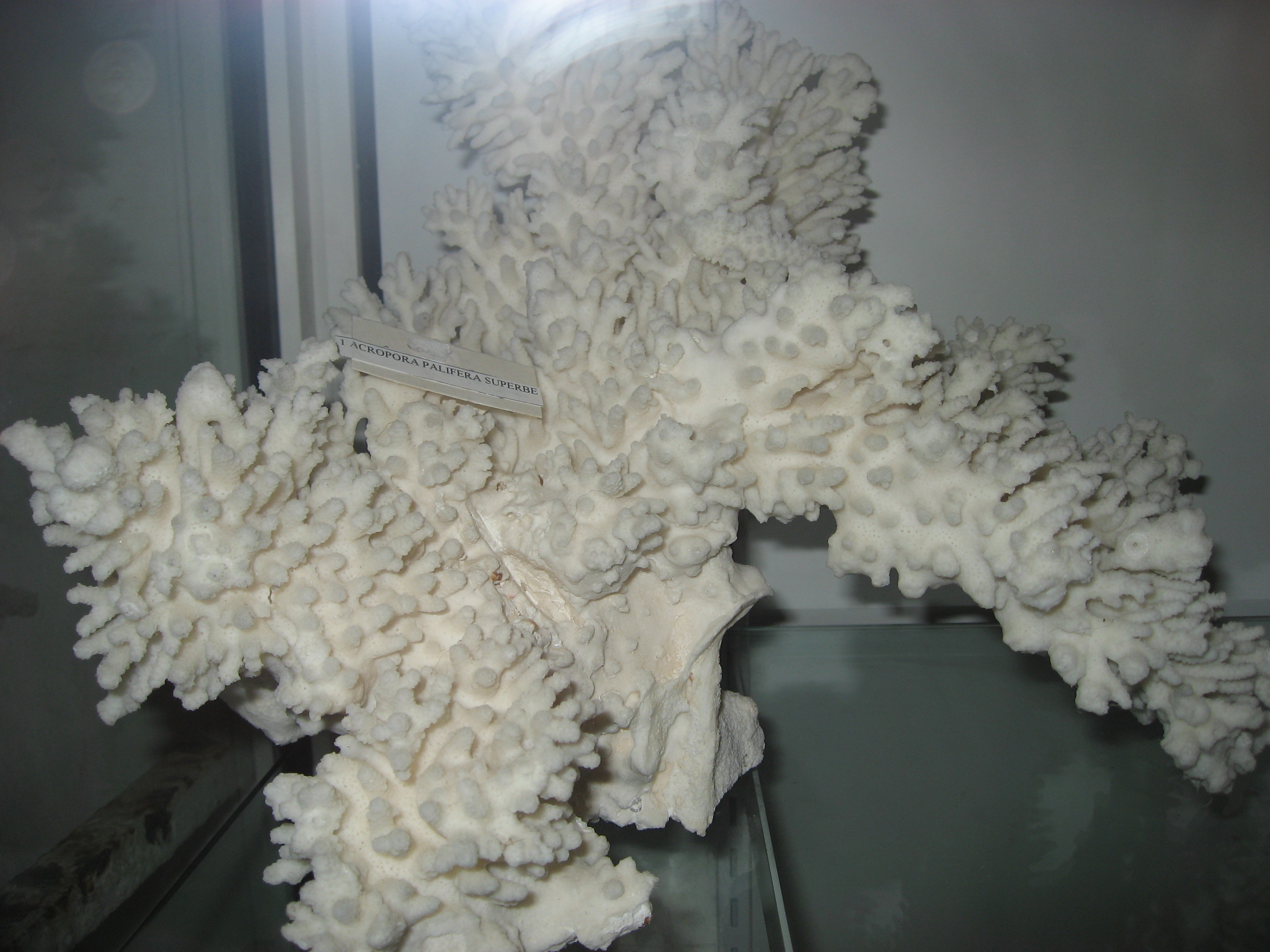 Acropora palifera au Fort Napoléon en Guadeloupe, îlet Terre de haut-de-haut l'archipel Saintes